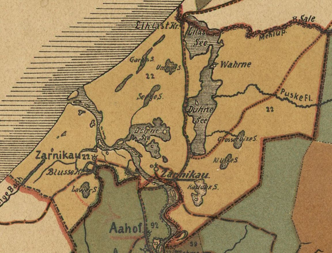 Carnikava kihelkonna mõisad 1905. aastal